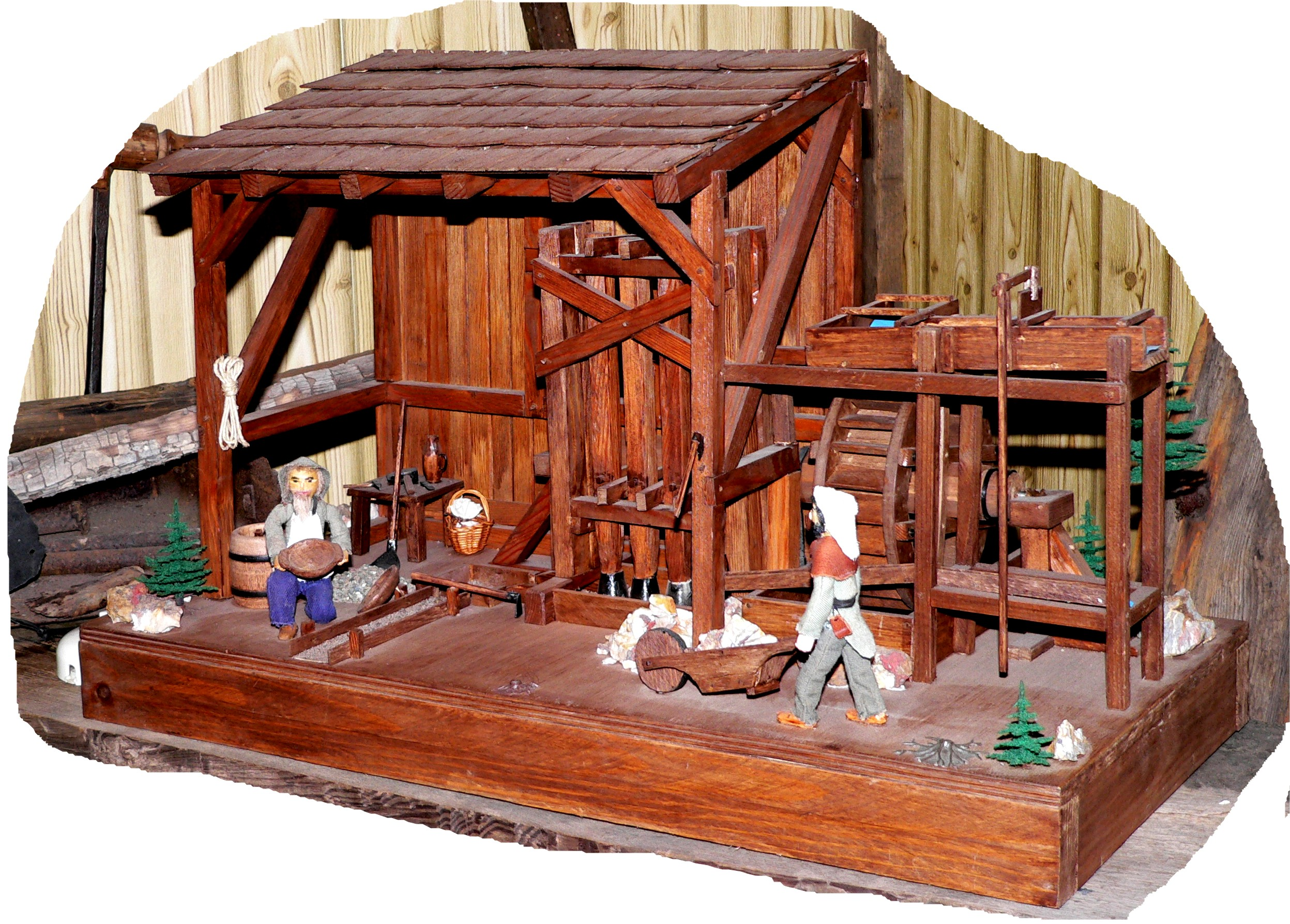 Modell eines wassergetriebenen Pochwerks zur Zerkleinerung goldhaltigen Gesteins